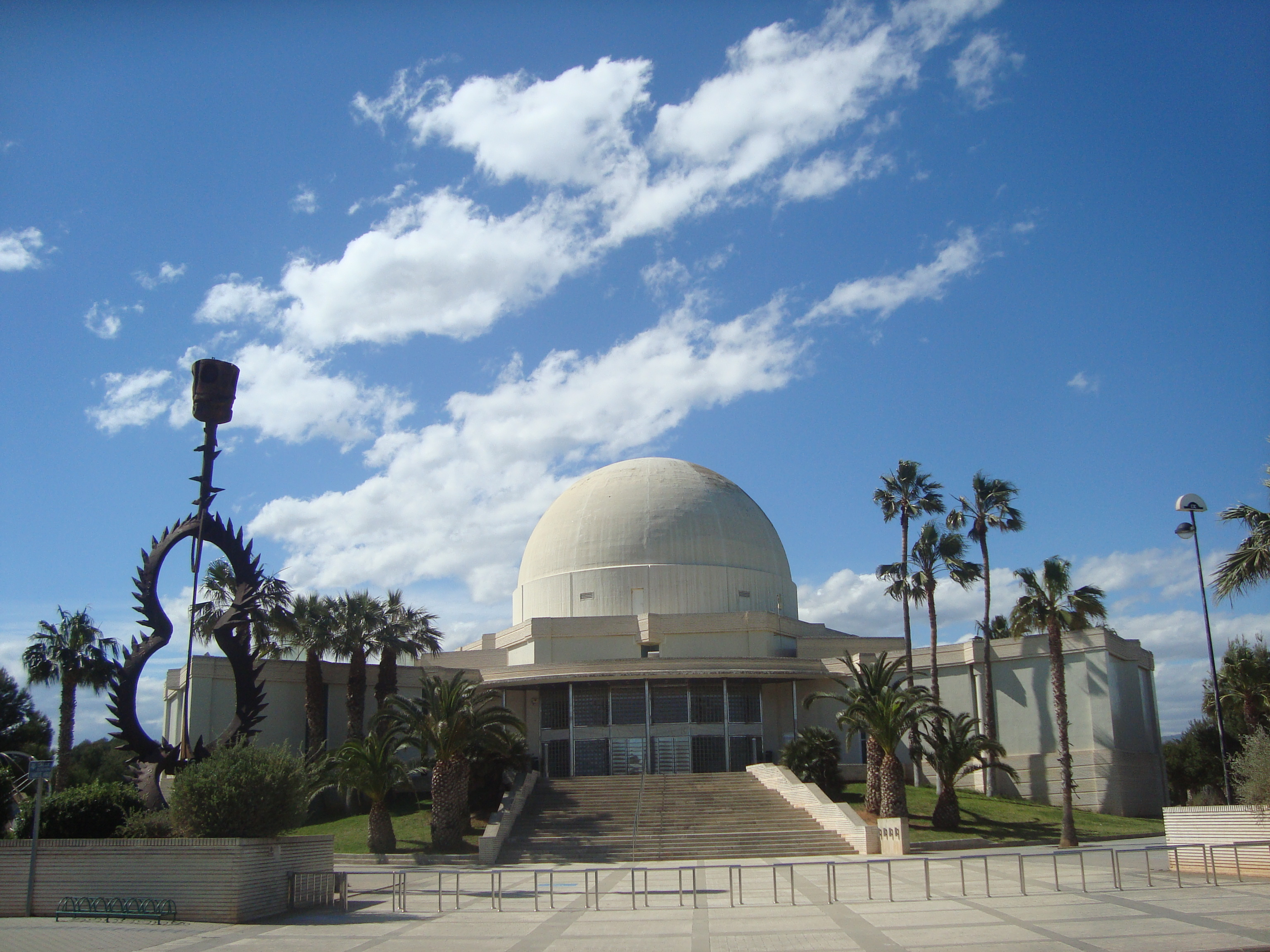 Planetario de Castellón de la Plana